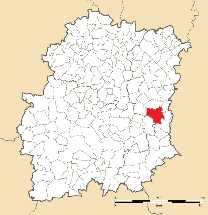 Carte de position de Champcueil en Essonne (91)